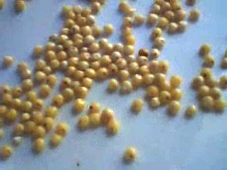 deshelled millet